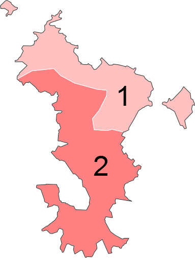 Résultats des élections législatives de Mayotte en 2012